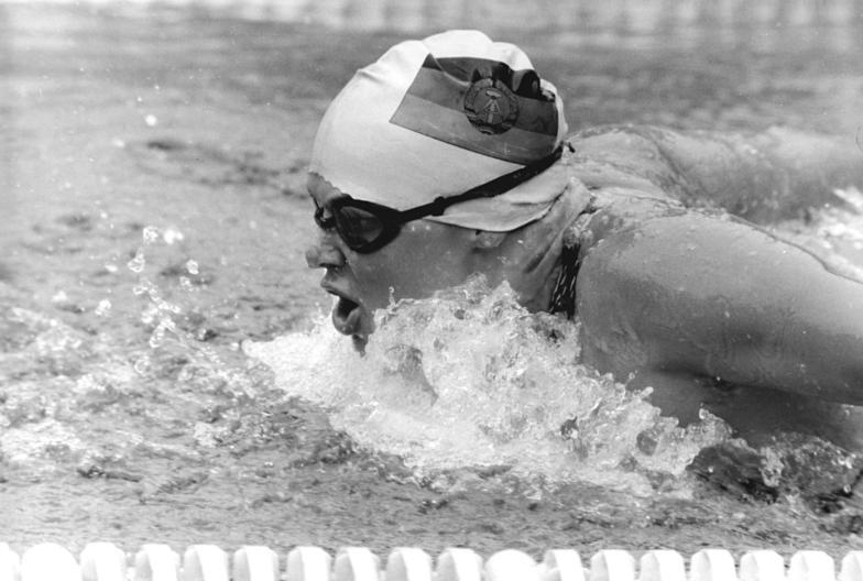 Andrea Pollack ADN-ZB Link 04.07-78 Berlin: 29. DDR-Meisterschaften im Sportschwimmen- Ihren zweiten Weltrekord bei den diesjährigen Titelkämpfen schwamm die Berliner Dynamo-Sportlerin Andrea Pollack am Abend des 4.7. im Berliner Friesenstadion. Über 200 m Schmetterlling erreichte sie phantastische 2:09,87 min nachdem sie bereits am Vortag eine neue Bestleistung über 100 m Schmetterling aufstellte.